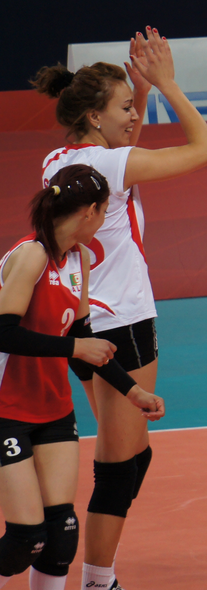 Tassadit Aissou